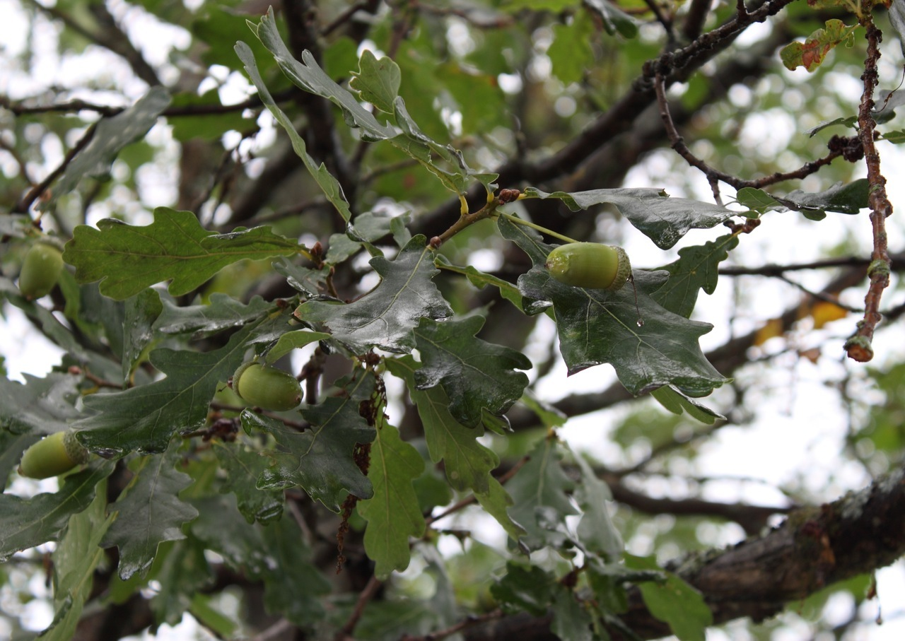 Dub (oak) in St.Petersburg